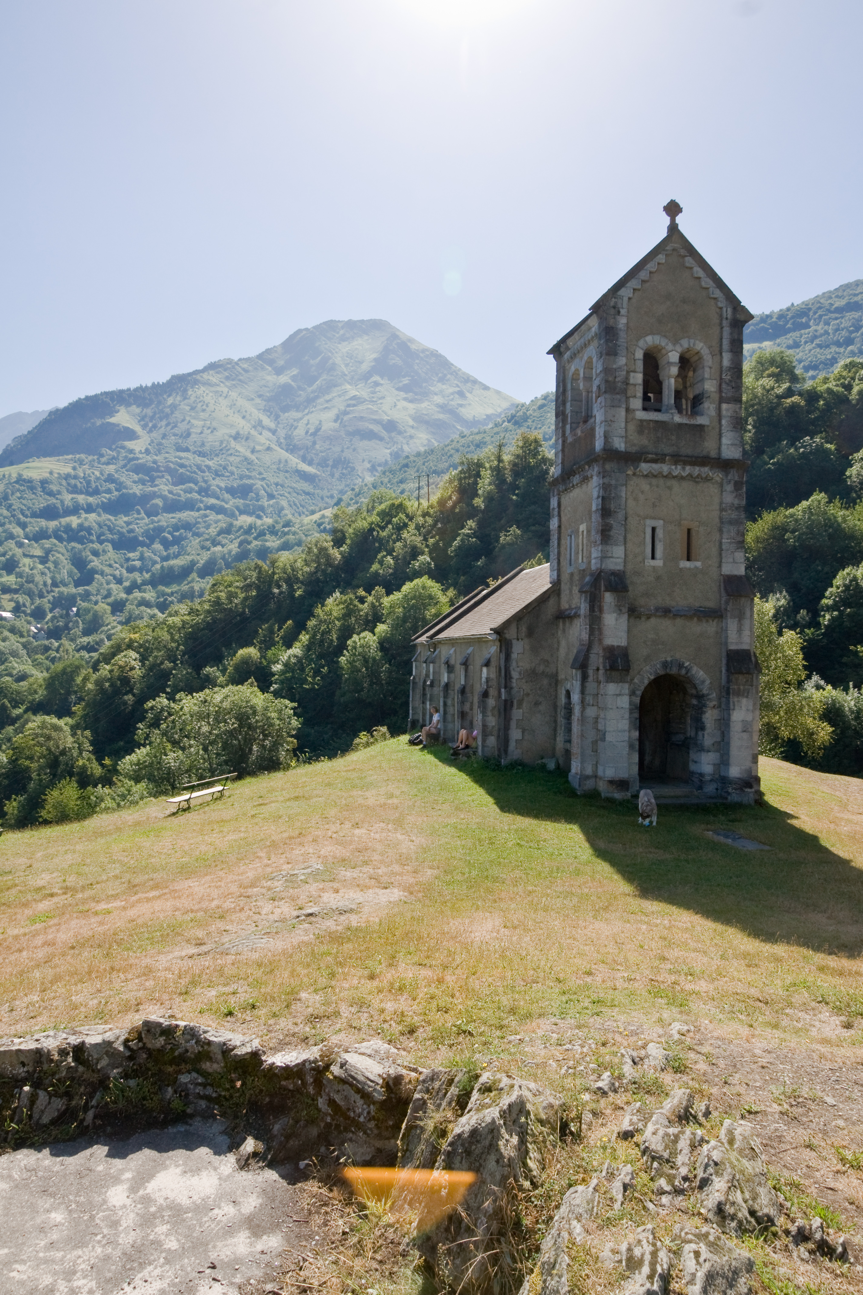 Luz Saint-Sauveur - Chapelle Solférino